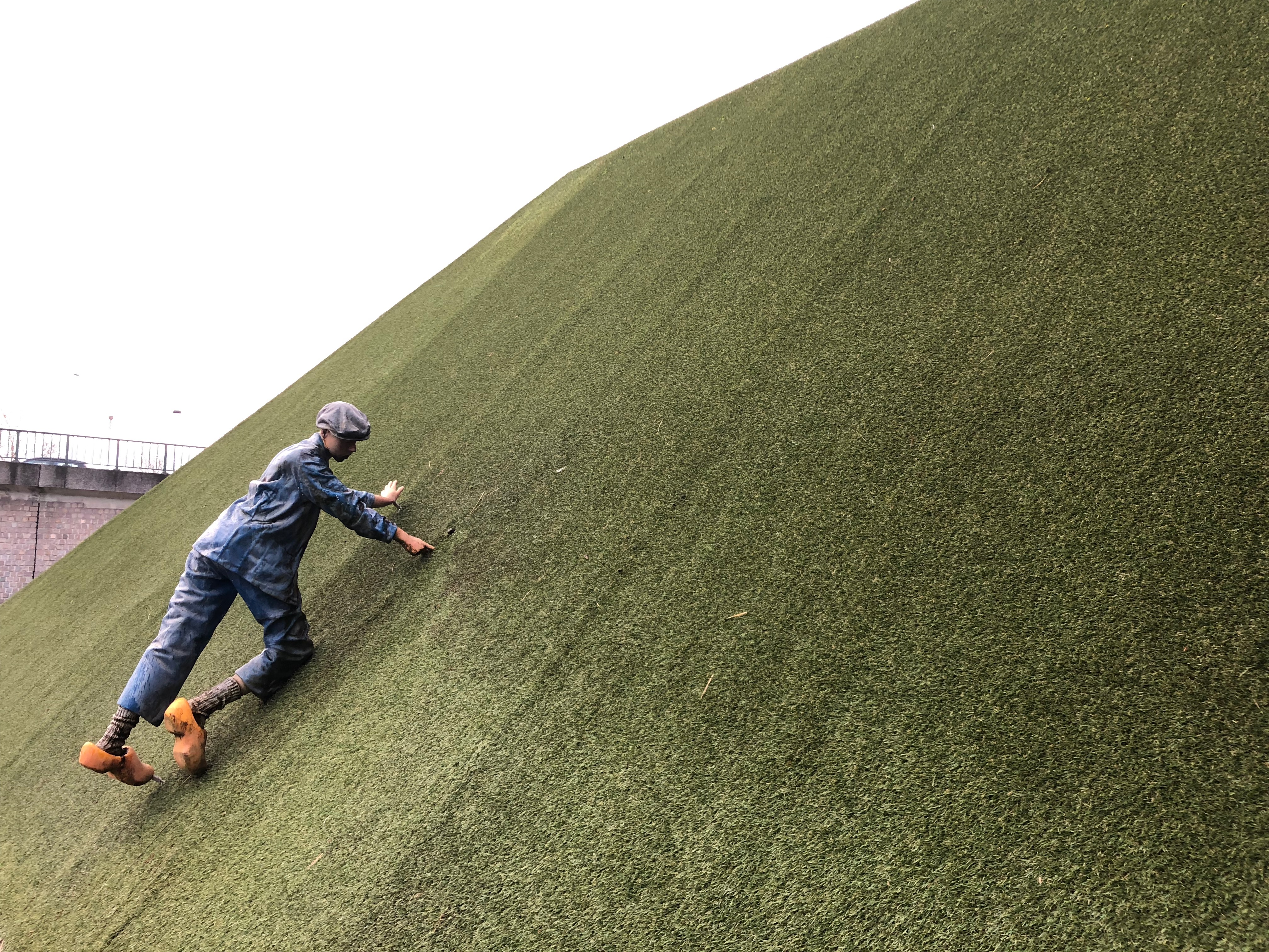 Hans Brinker at the entrance of Madurodam 01